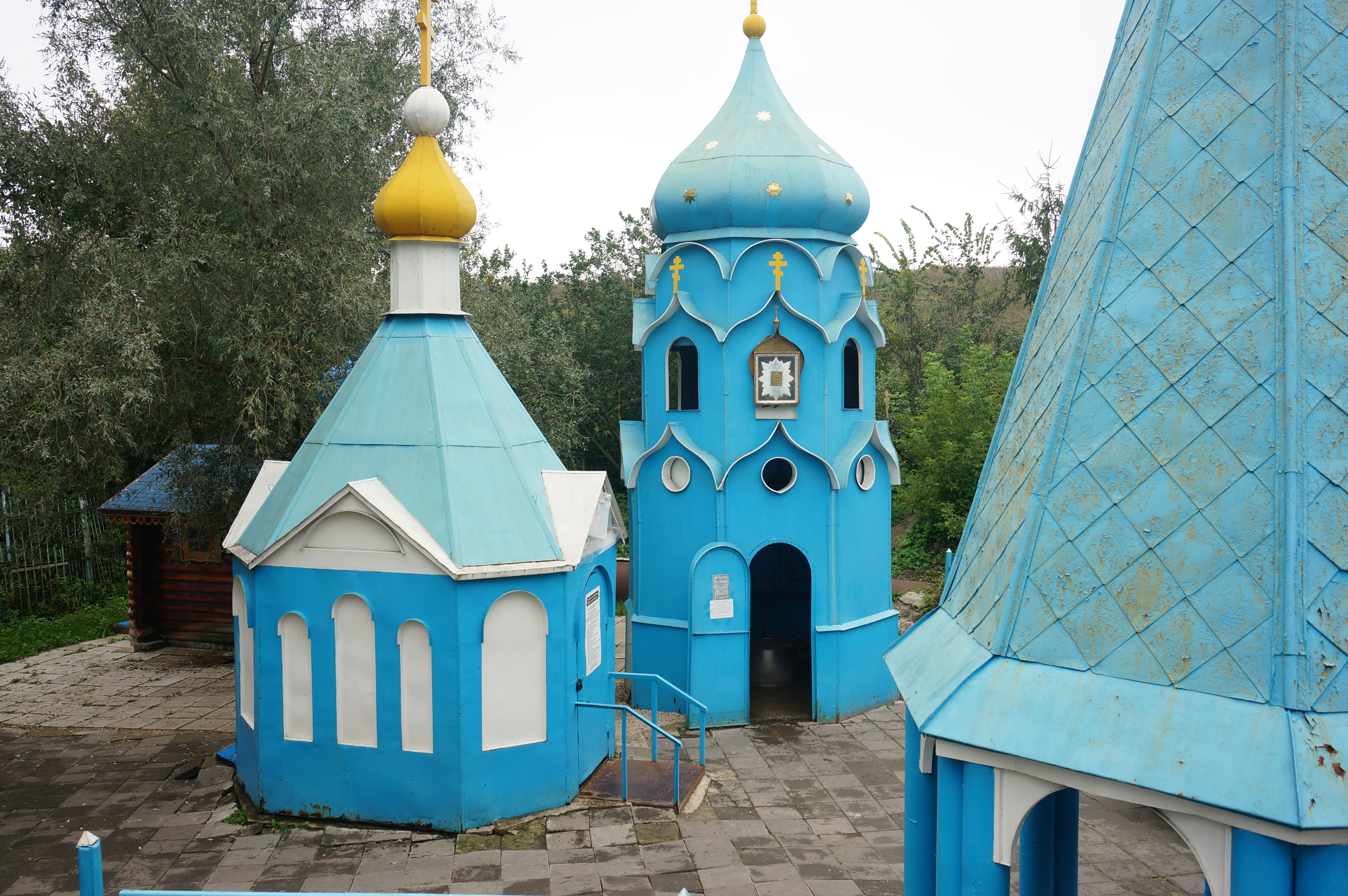 Святой источник чудотворной иконы Божией Матери "Избавительница от бед". Село Ташла, Ставропольский район Самарской области, Россия